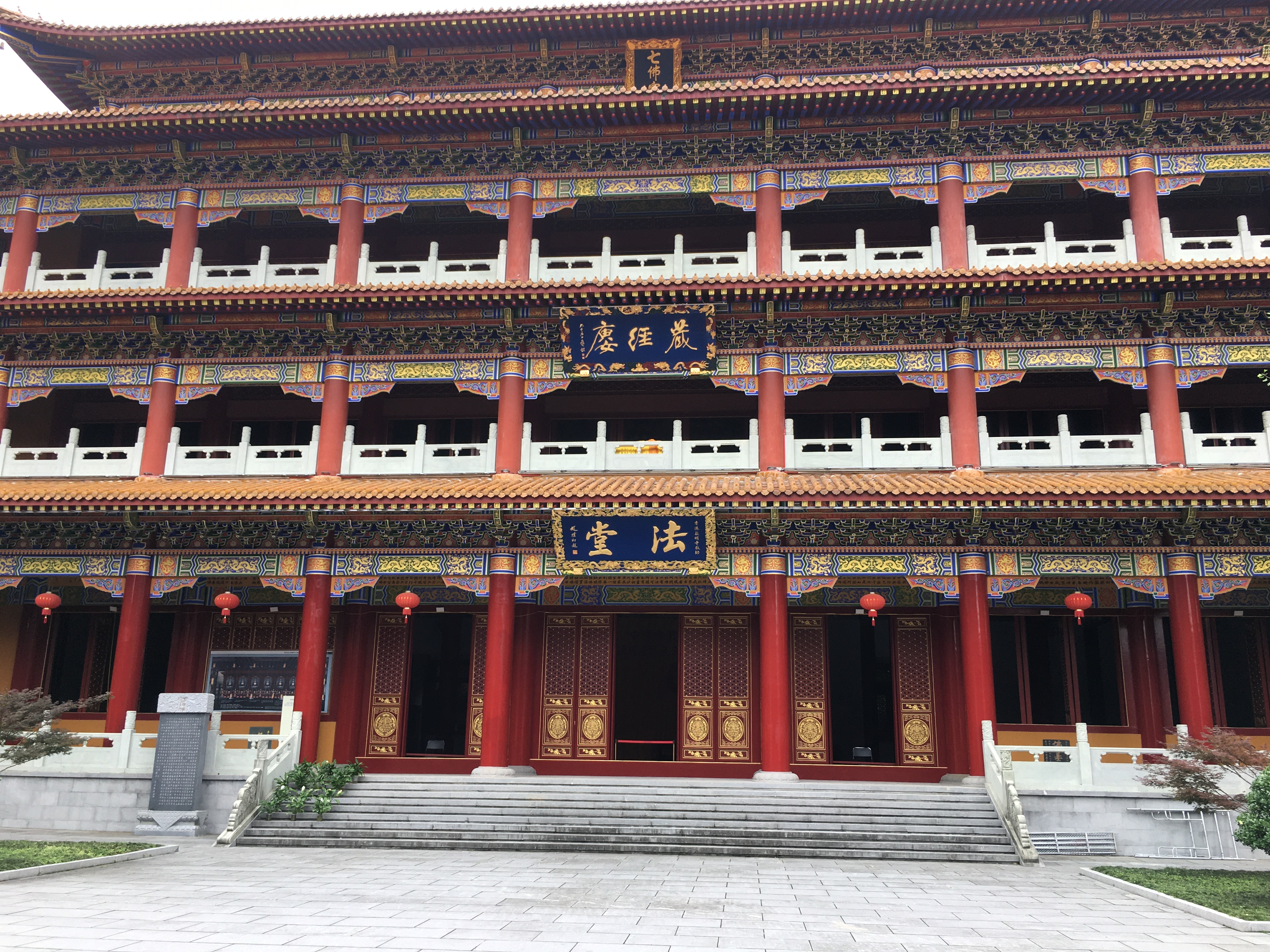 中文（中国大陆）: 杭州天目山禅源寺藏经阁的正面照